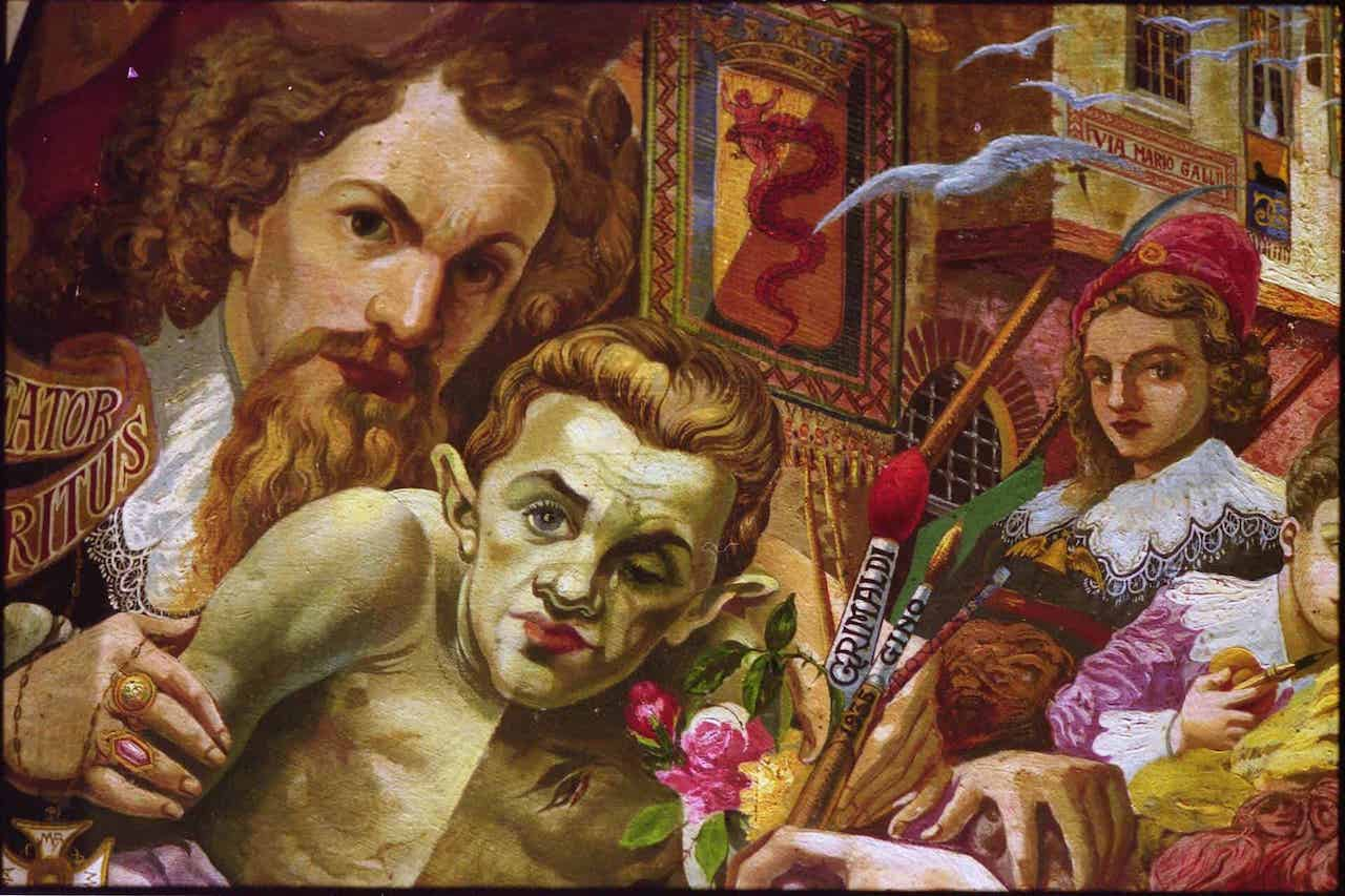 Affresco della chiesa del manicomio di Cogoleto